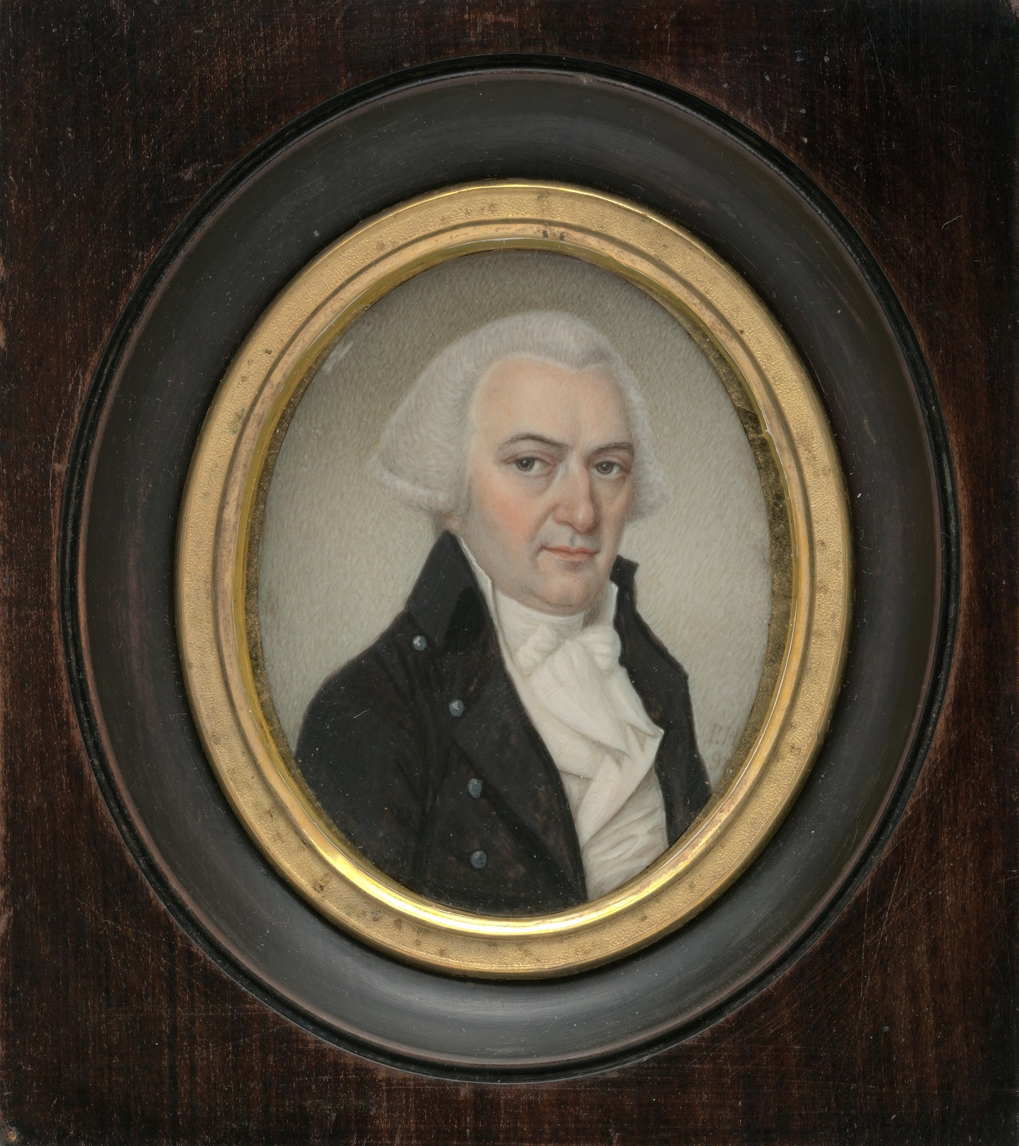 Painting, miniature; Paintings